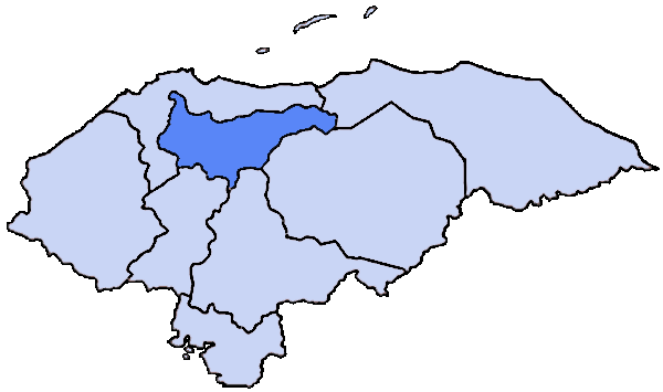 Mappa della diocesi cattolica di Yoro, in Honduras.